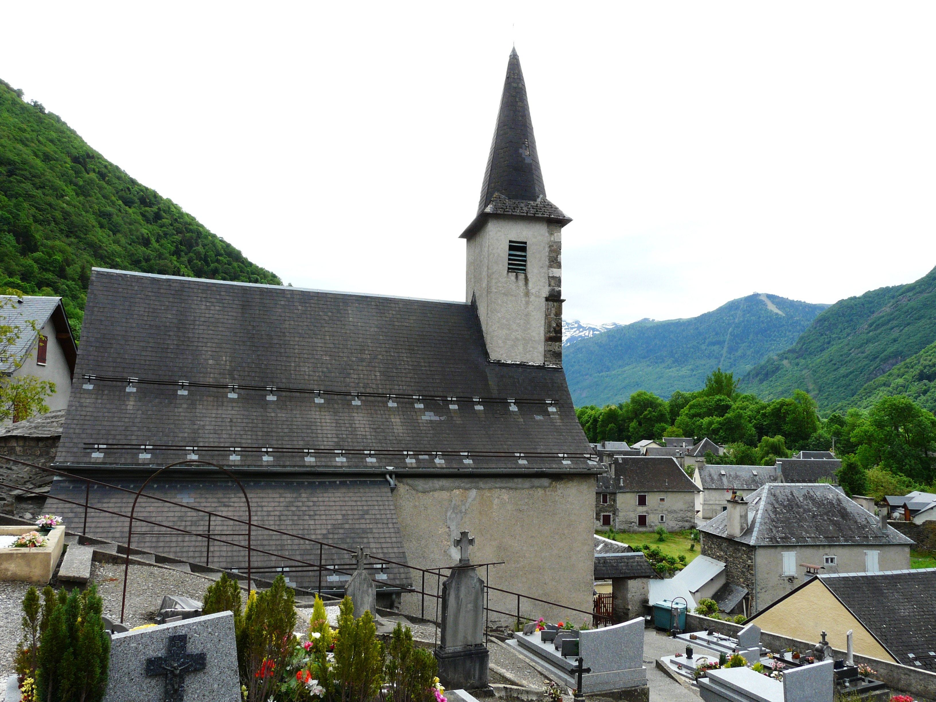 Le village de Salles-et-Pratviel, Haute-Garonne, France.